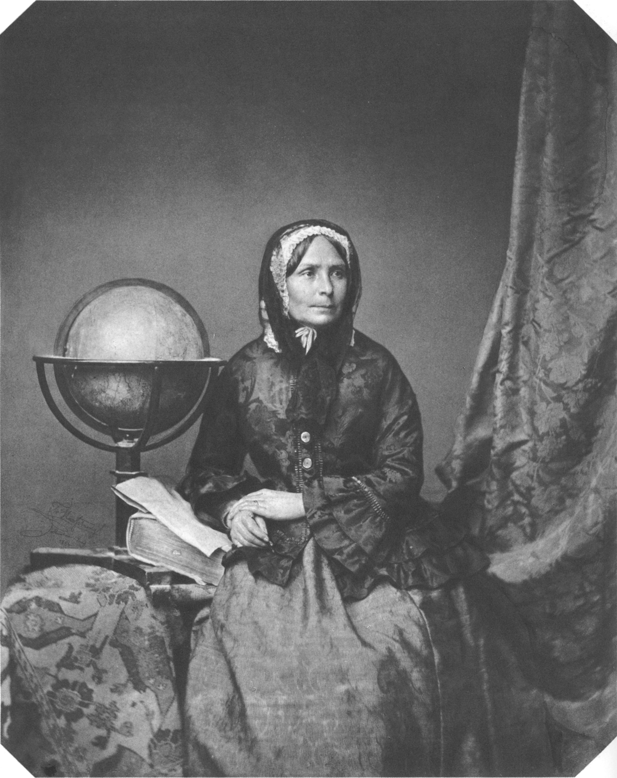 Ida Laura Reyer-Pfeiffer (1797-1858)